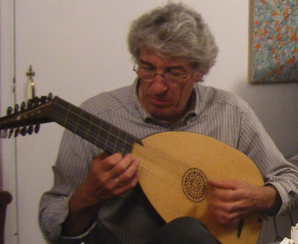 Jean-Marie Poirier chez David Van Edwards, luthier à Norwich, Angleterre